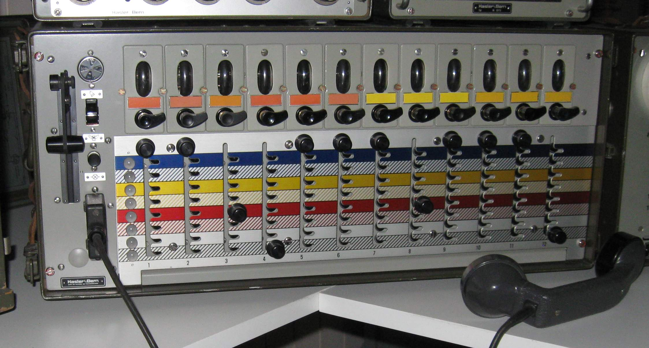 Feldtelefonzentrale 57 der Schweizer Armee